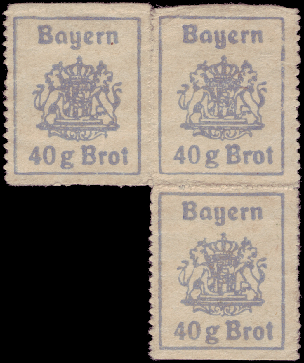 40gr Brot-Rationsmarken aus Bayern aus der Zeit des ersten Weltkrieges